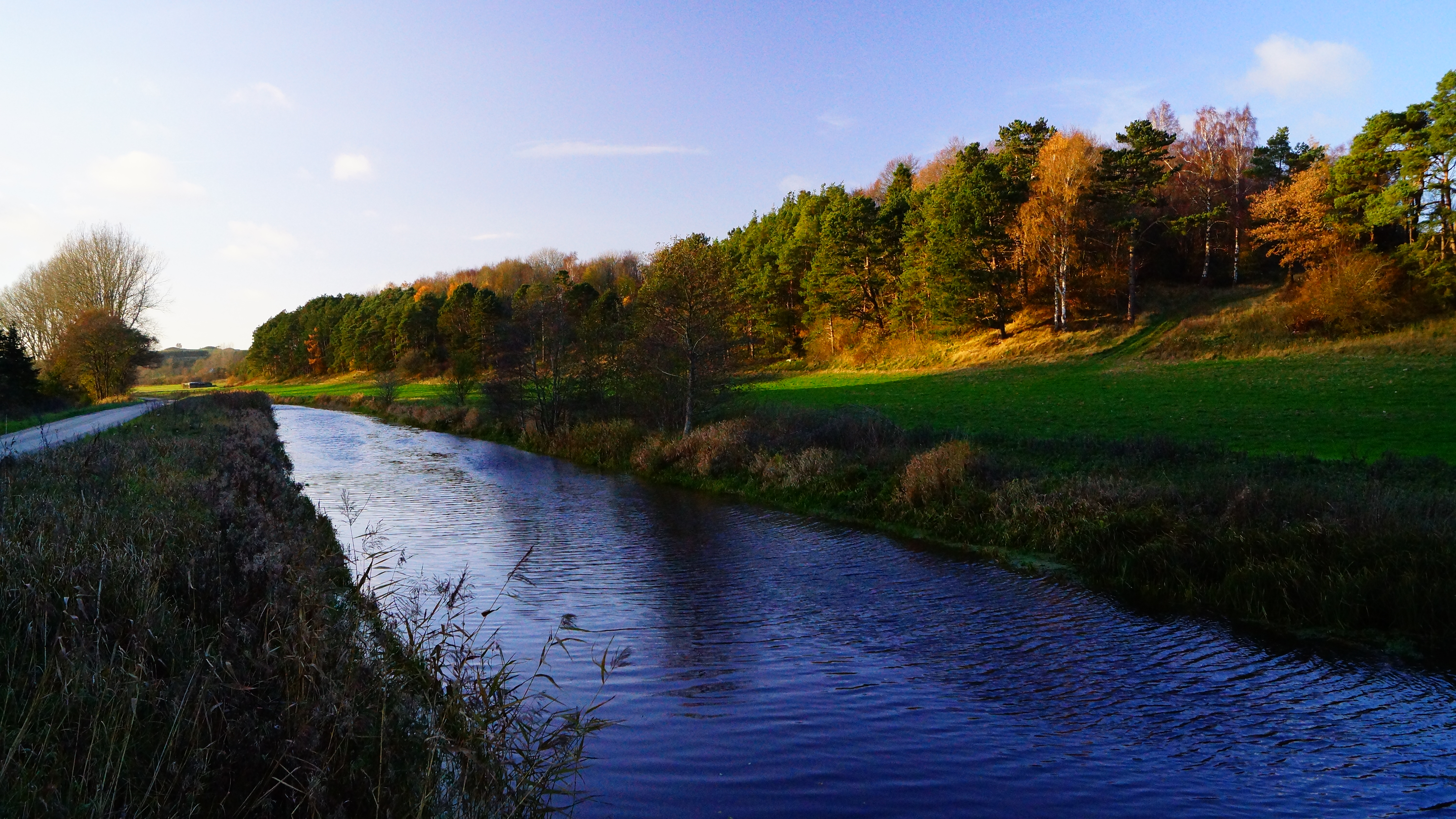 Kolindsund Nordre landkanal